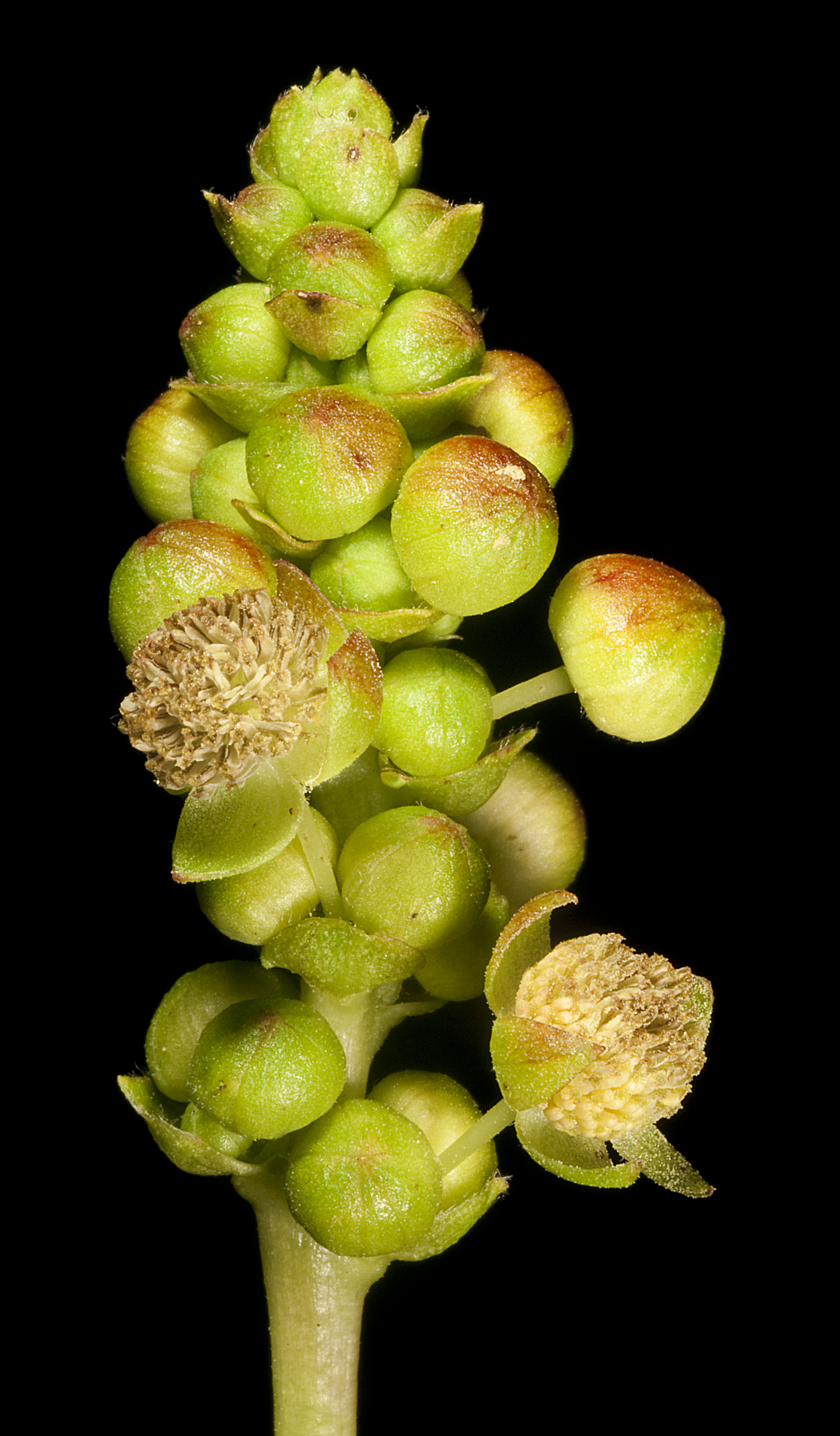 KRT4049